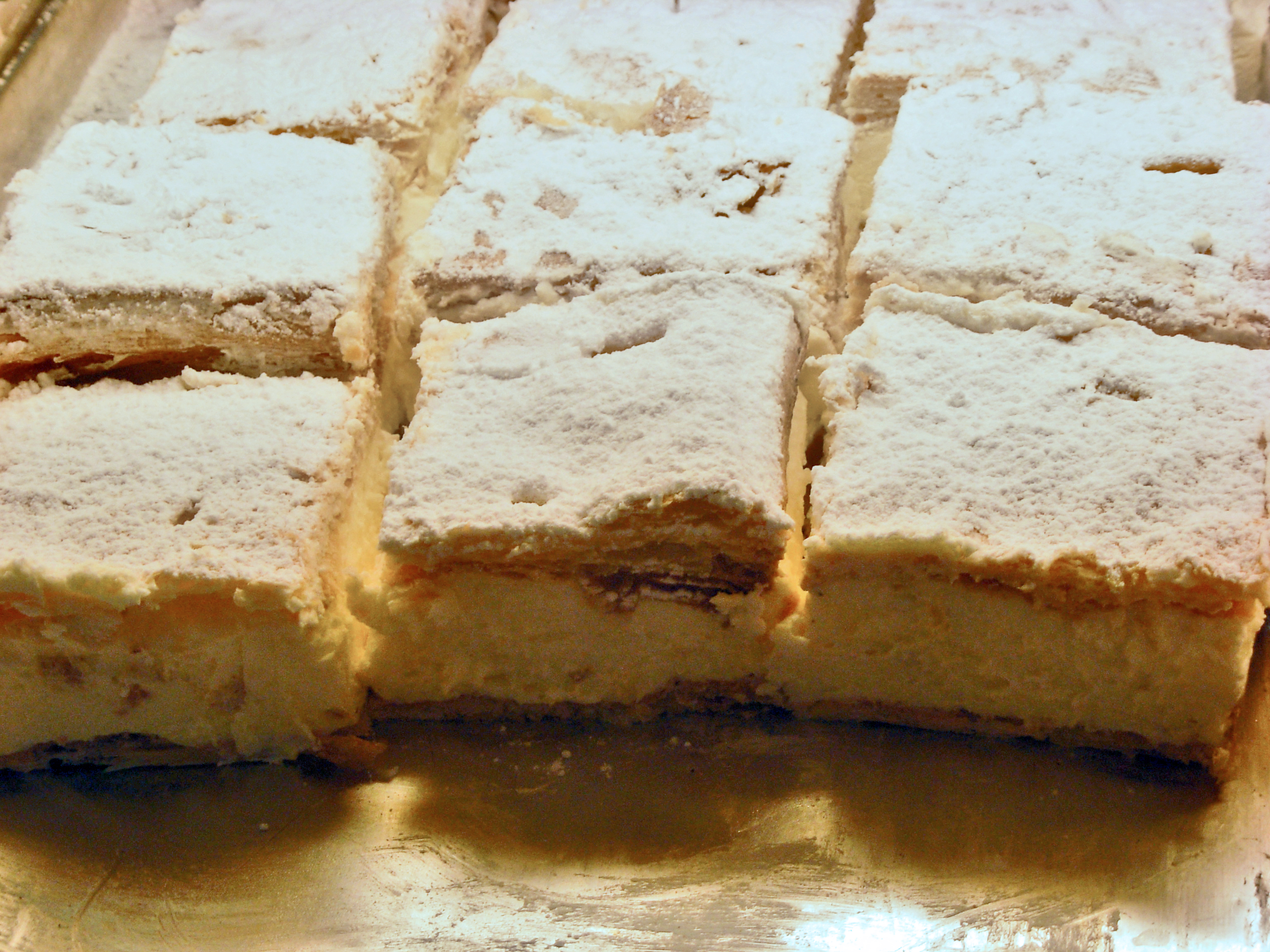 Kremówki